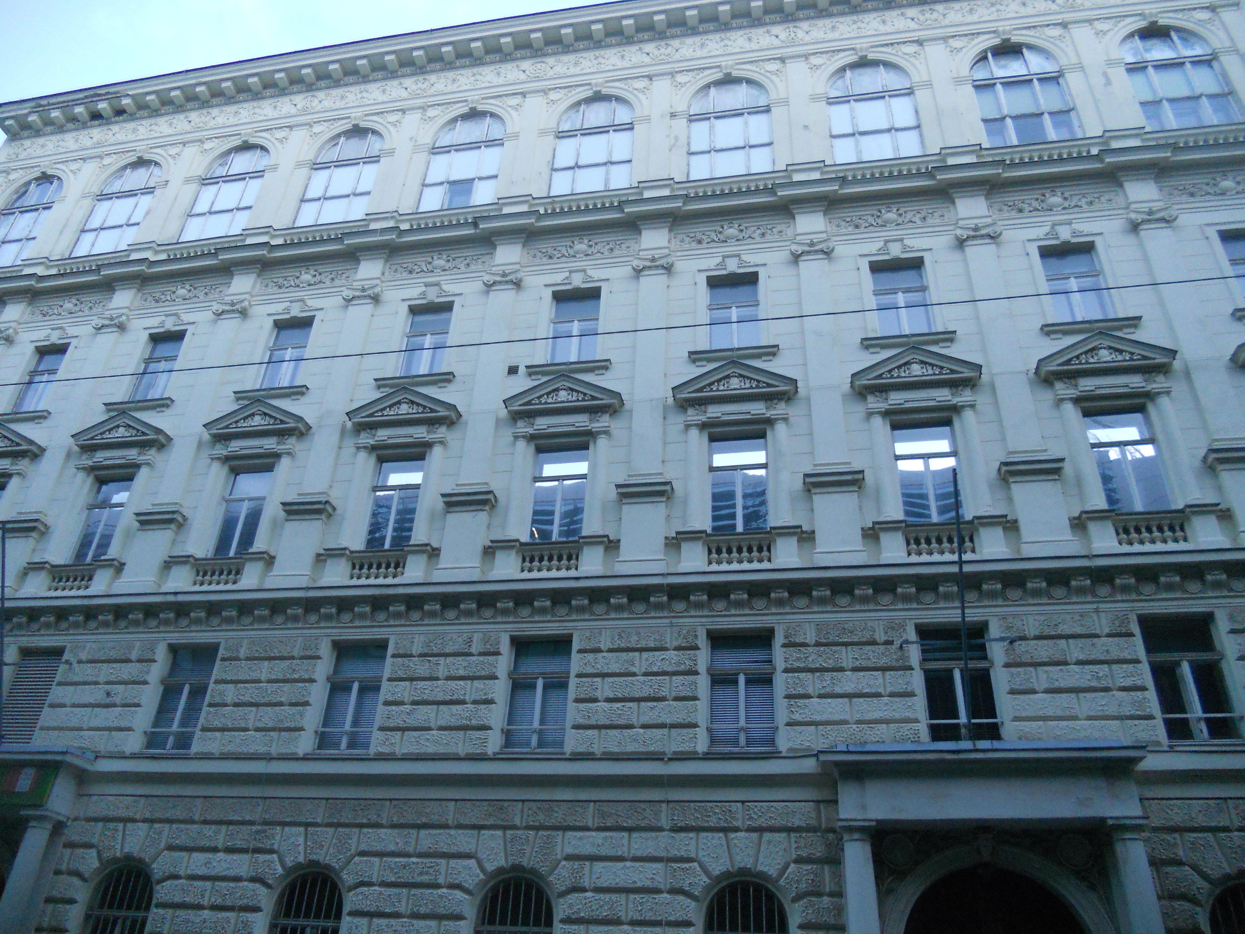 Haus Lehárgasse 7 In Wien, ehemalige Telefonzentrale